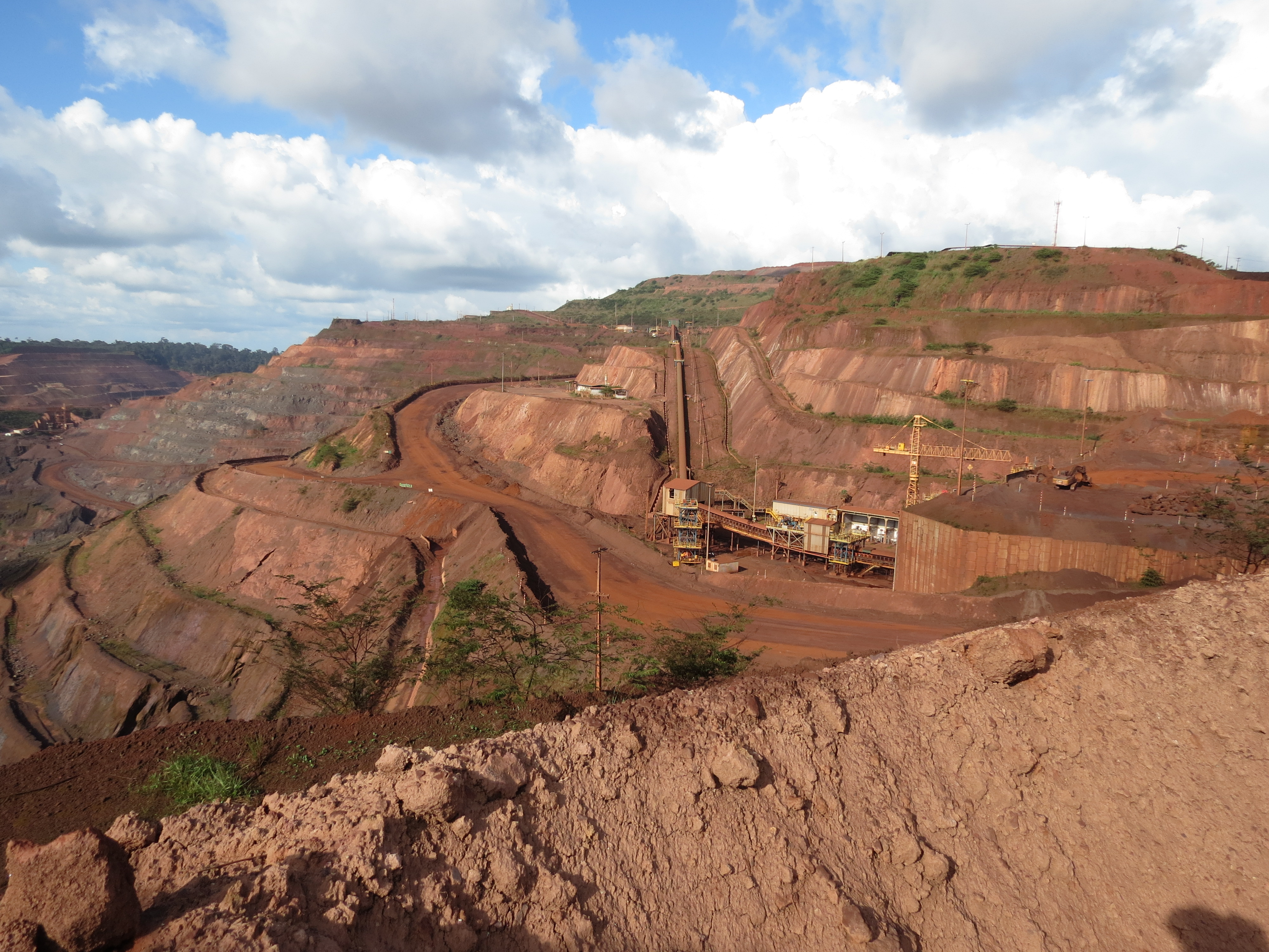 Mina serra N1.